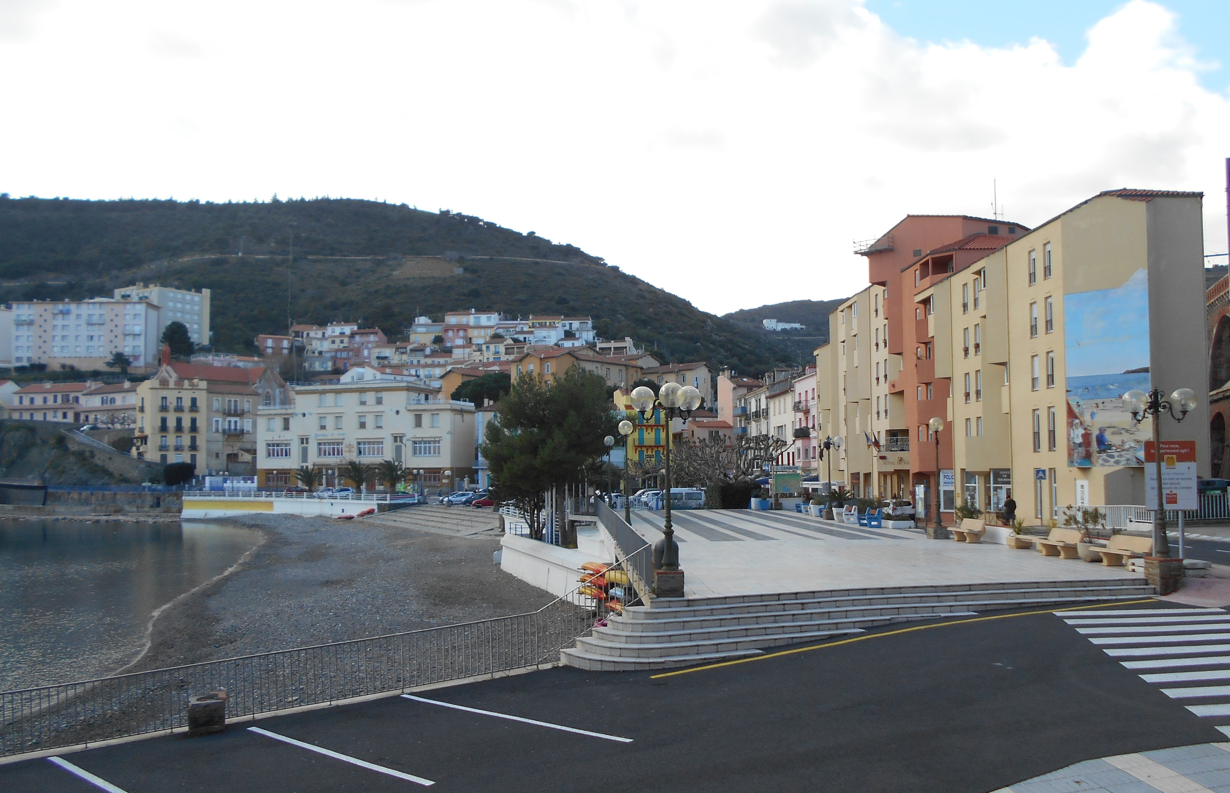 Vista general de Cervera de la Marenda